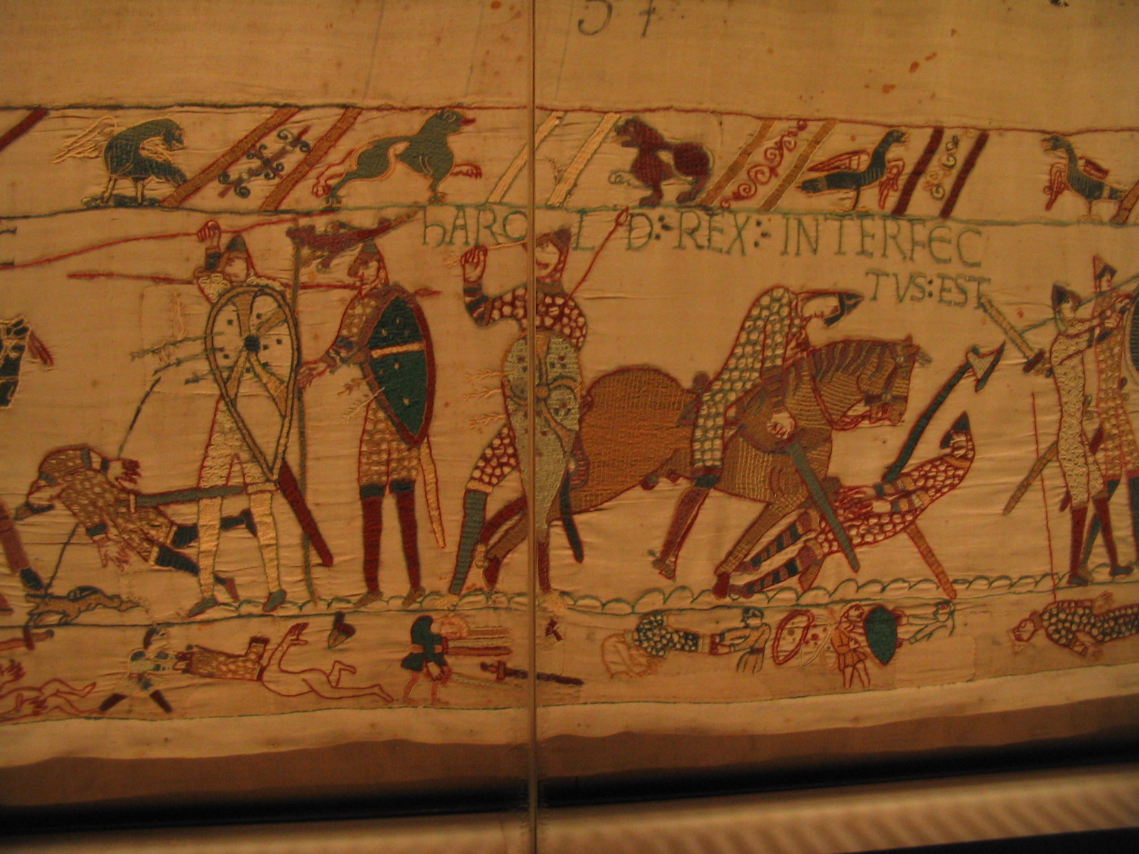 Bayeux Tapestry fragment